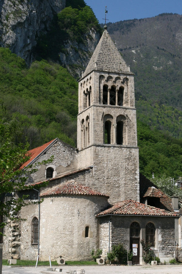 Eglise Saint Pierre de Sassenage (construite en 1080) (Isère, France)